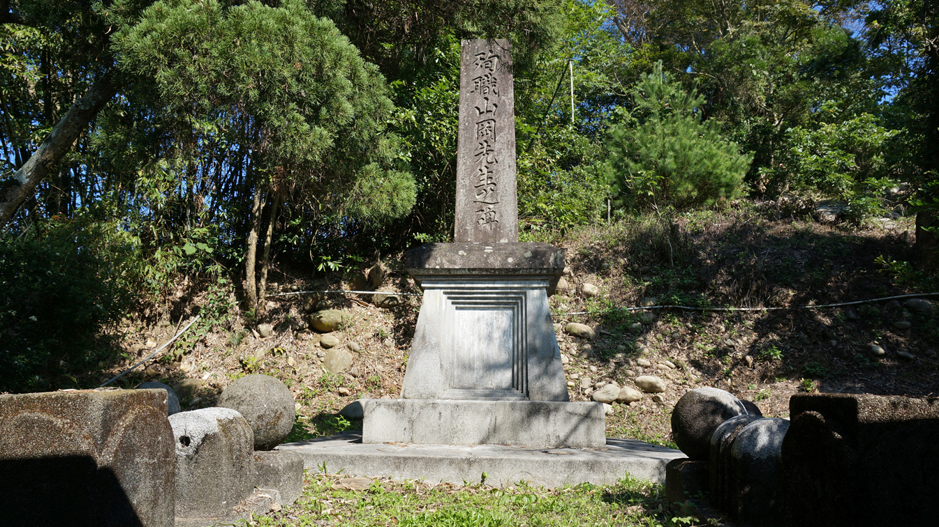 中文（台灣）: 殉職山崗先生之碑。